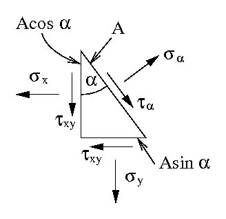 Spannungen an einem freigeschnittenen Dreieck im ebenen Spannungszustand